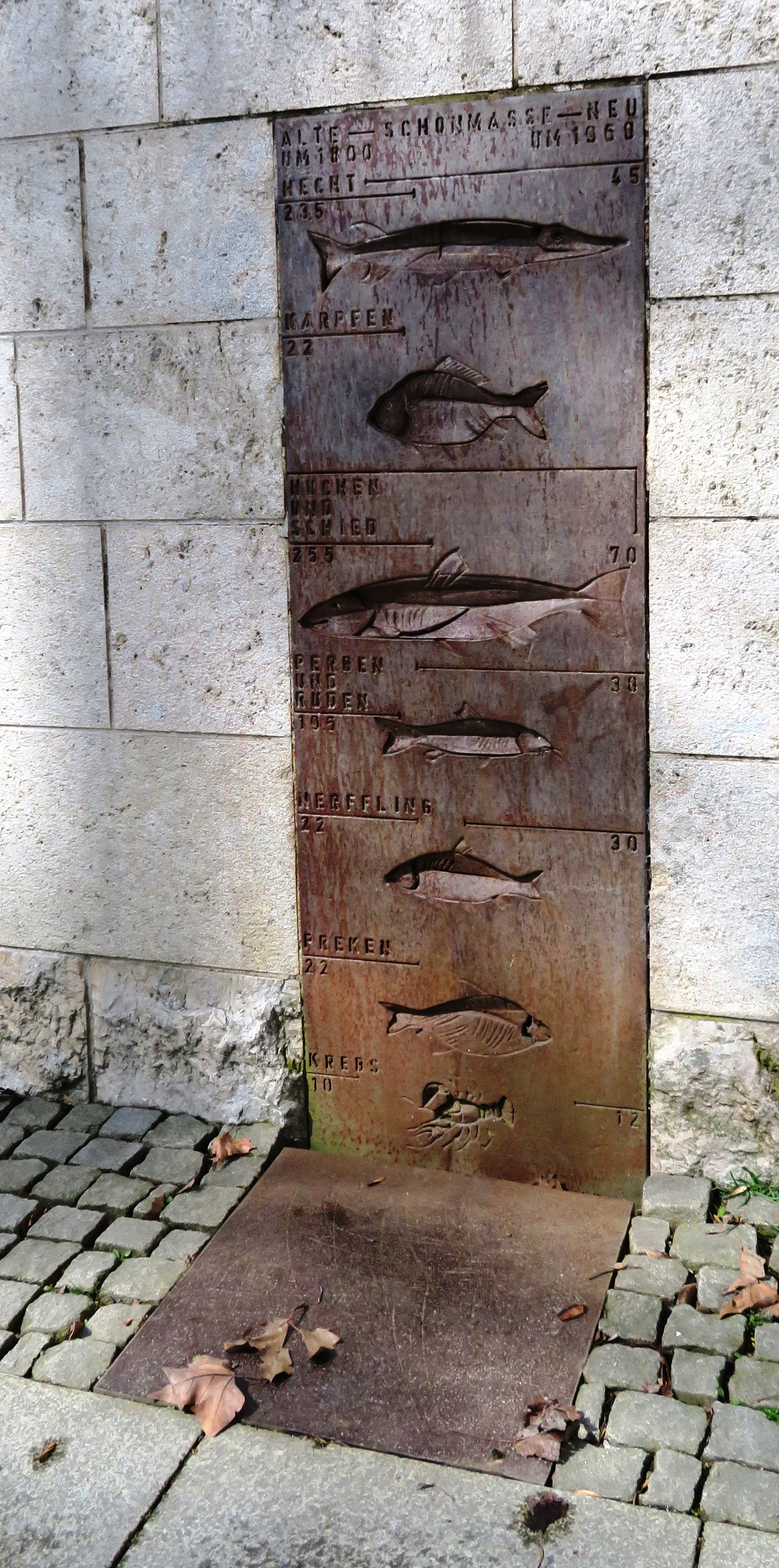 Schonmaße früher und heute